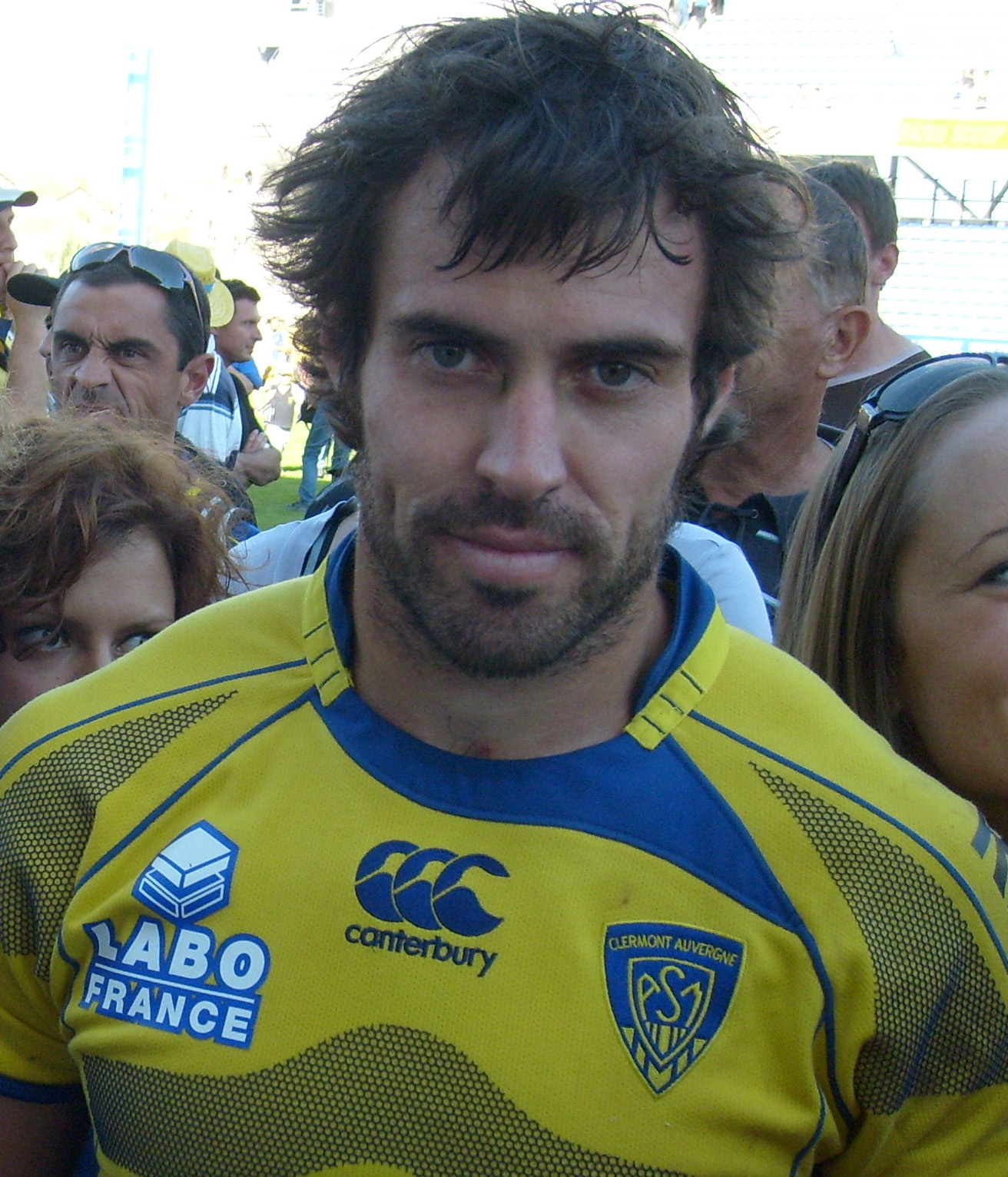 Brock James souriant après avoir défait l'Aviron Bayonnais dans les rangs de l'ASM Clermont Auvergne au stade Marcel Michelin de Clermont-Ferrand.